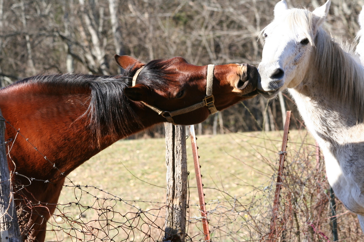 Dois cavalos trocando uma bicota.